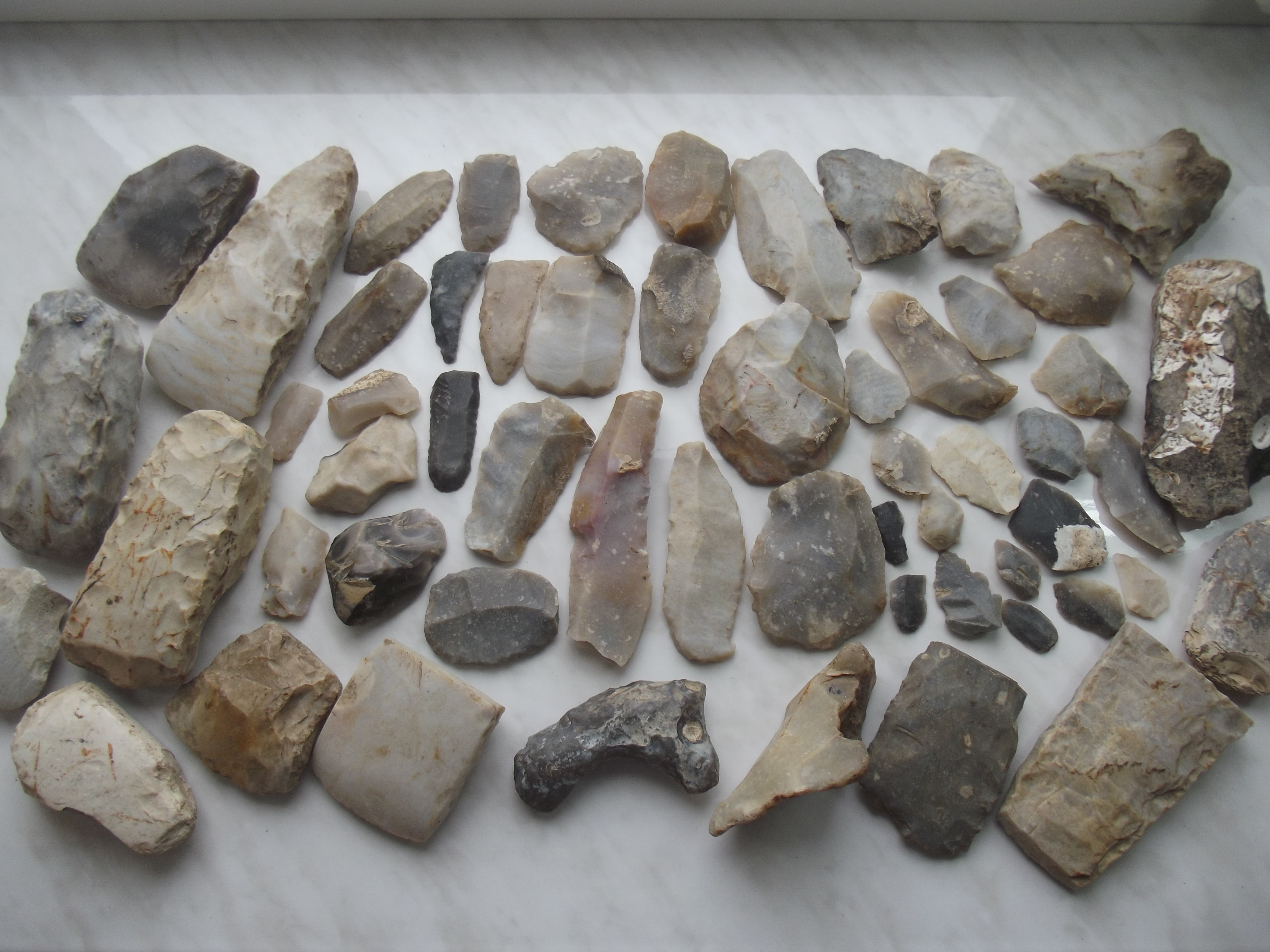 Кременева індустрія трипільців рудковецьких поселень: Вироби з кременю, знайдені в орному шарі грунту (с. Рудківці. Україна). Внизу в центрі необроблений кремінь у вигляді голови коня.